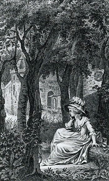 Illustratie voor ‘De Bouval. Aan Eucrates’ van Elisabeth Maria Post, uit de bundel "Voor Eenzamen", 1789.